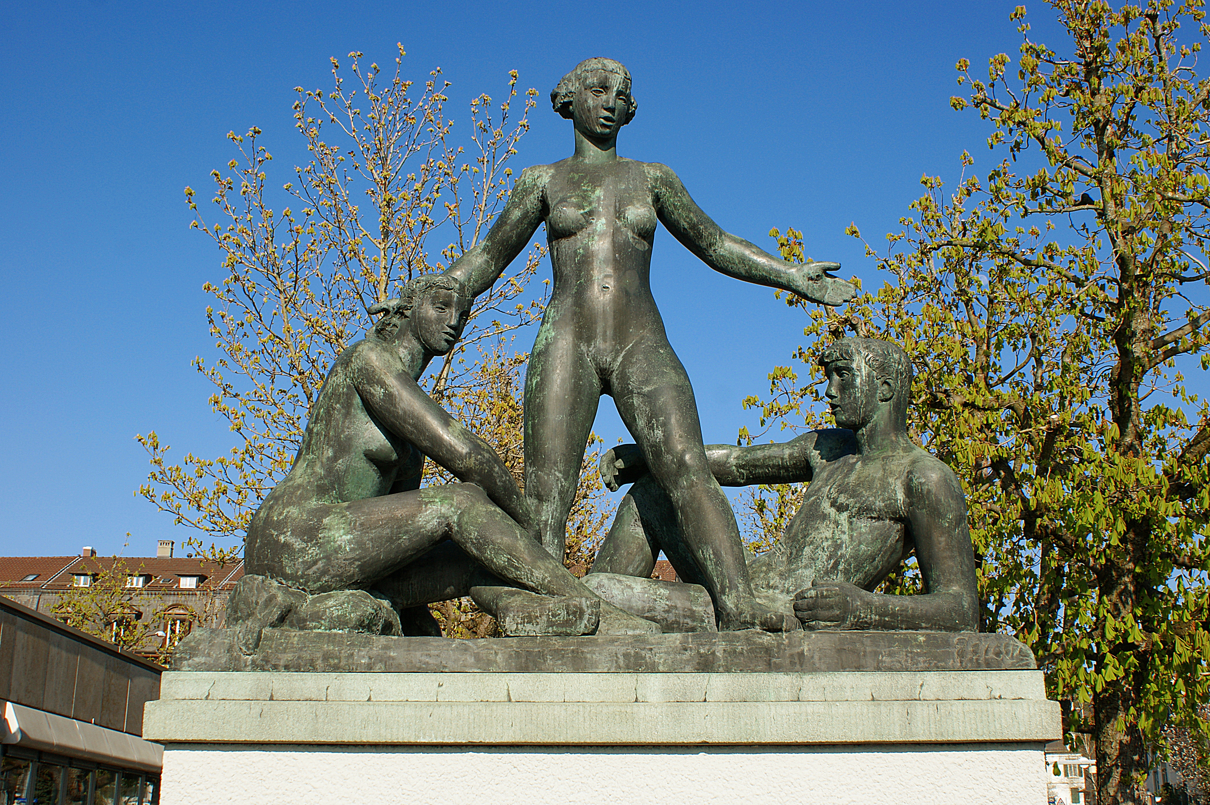 Bronzeplastik Mädchengruppe (Karl Geiser 1937)